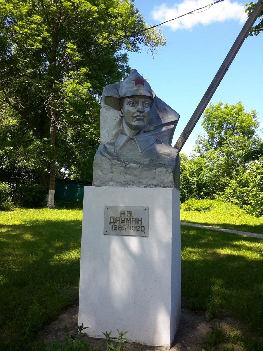 Обаль. Помнік А.Э. Даўману